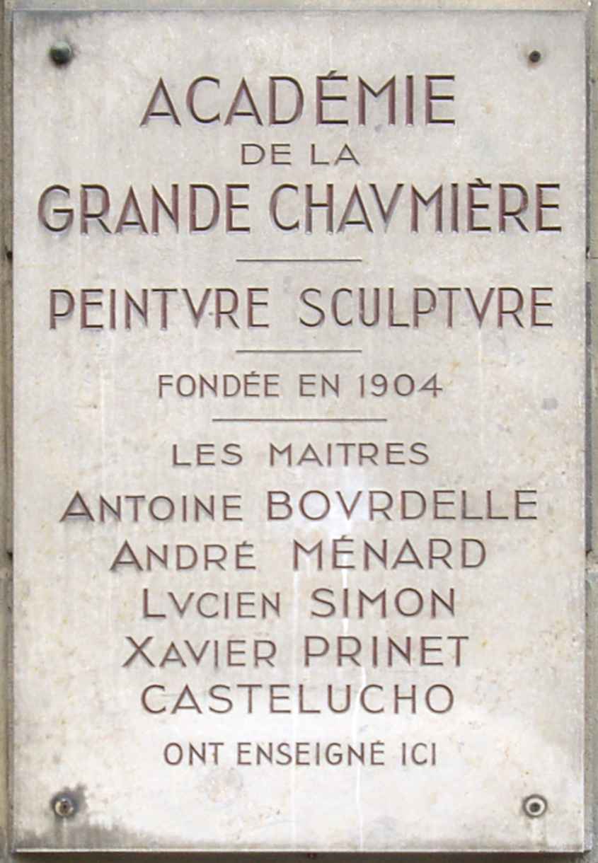 Plaque de l'Académie de la Grande Chaumière, 14 rue de la Grande Chaumière, Paris 6e.